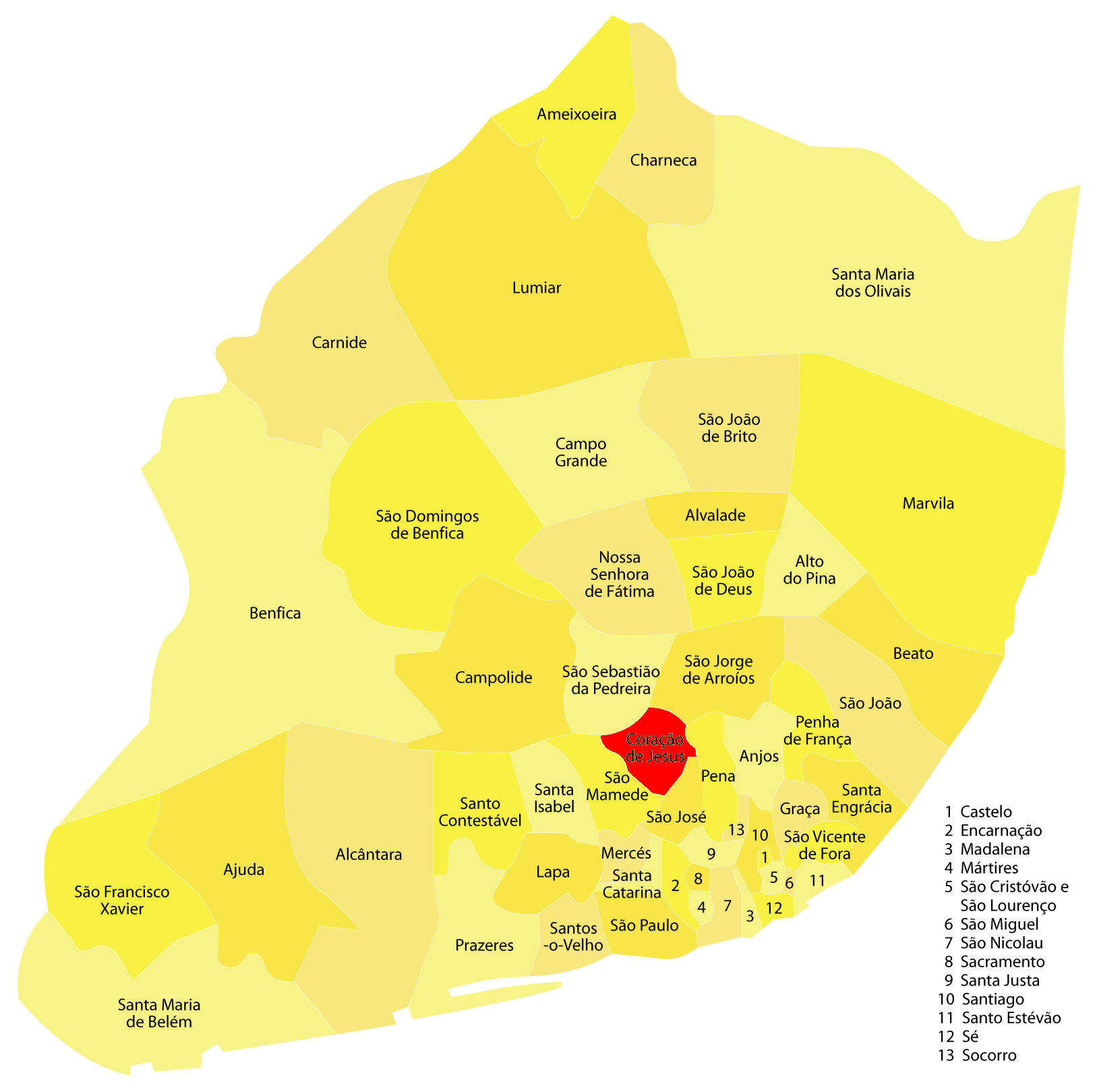 localização da Freguesia do Coração de Jesus